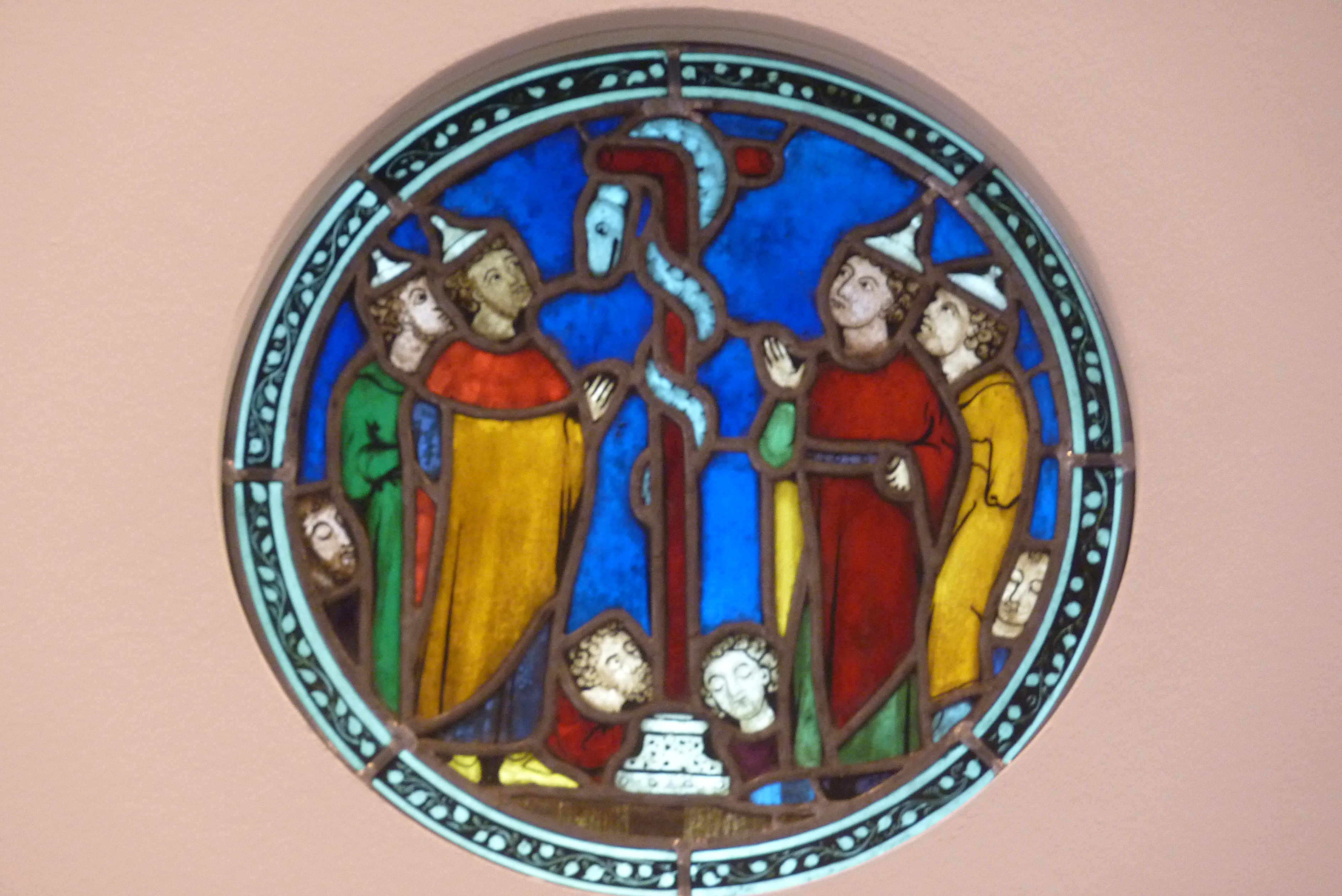 Museum Schnütgen in Köln, Bleiglasfenster: Moses und die Eherne Schlange, Trier?, ca. 1225-50.